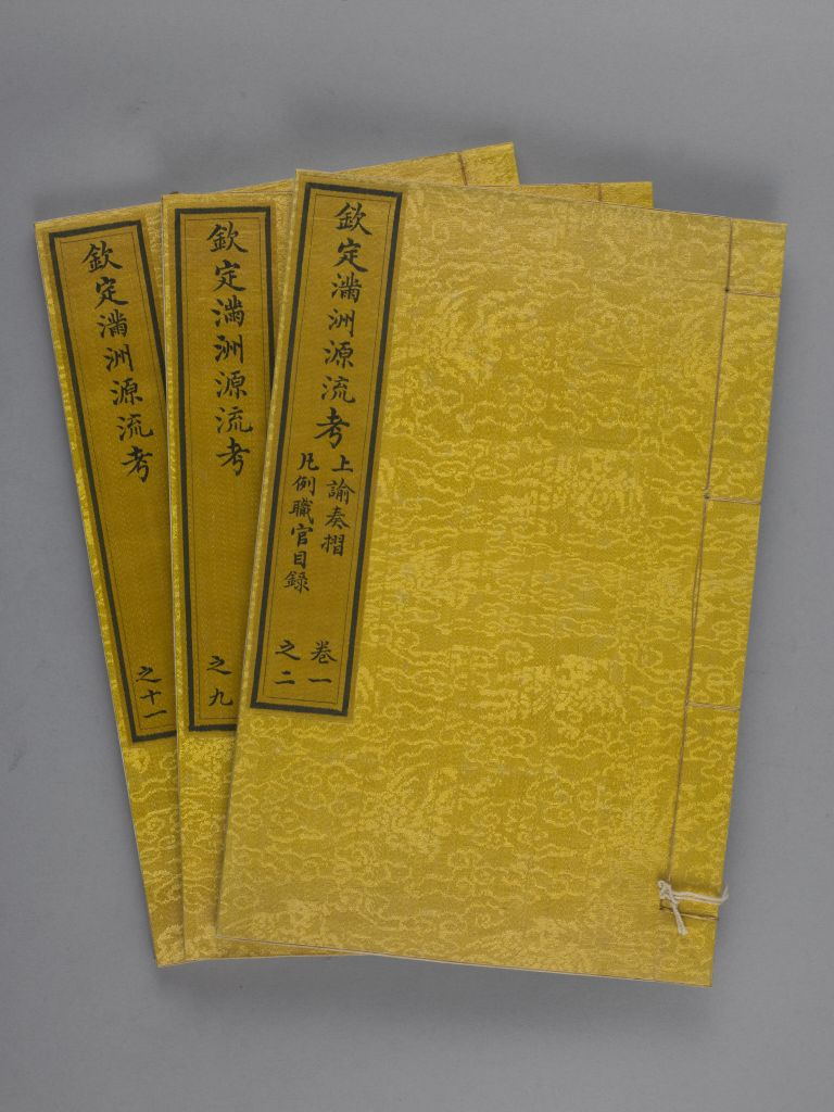 《钦定满洲源流考》，二十卷，清阿桂等撰，清乾隆四十二年（1777年）武英殿刻本。